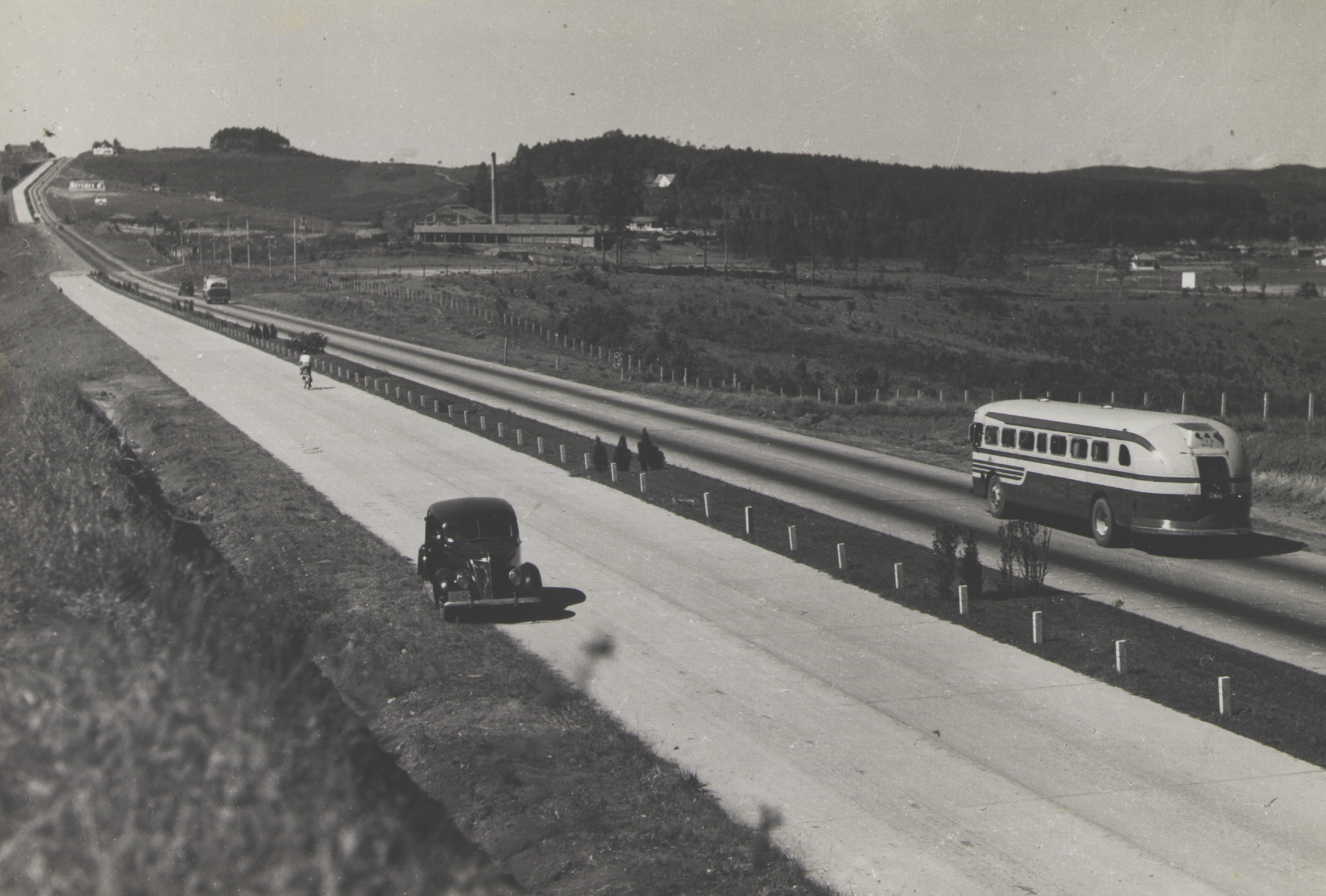 Obra que integra o acervo do Museu Paulista da USP. Coleção Werner Haberkorn